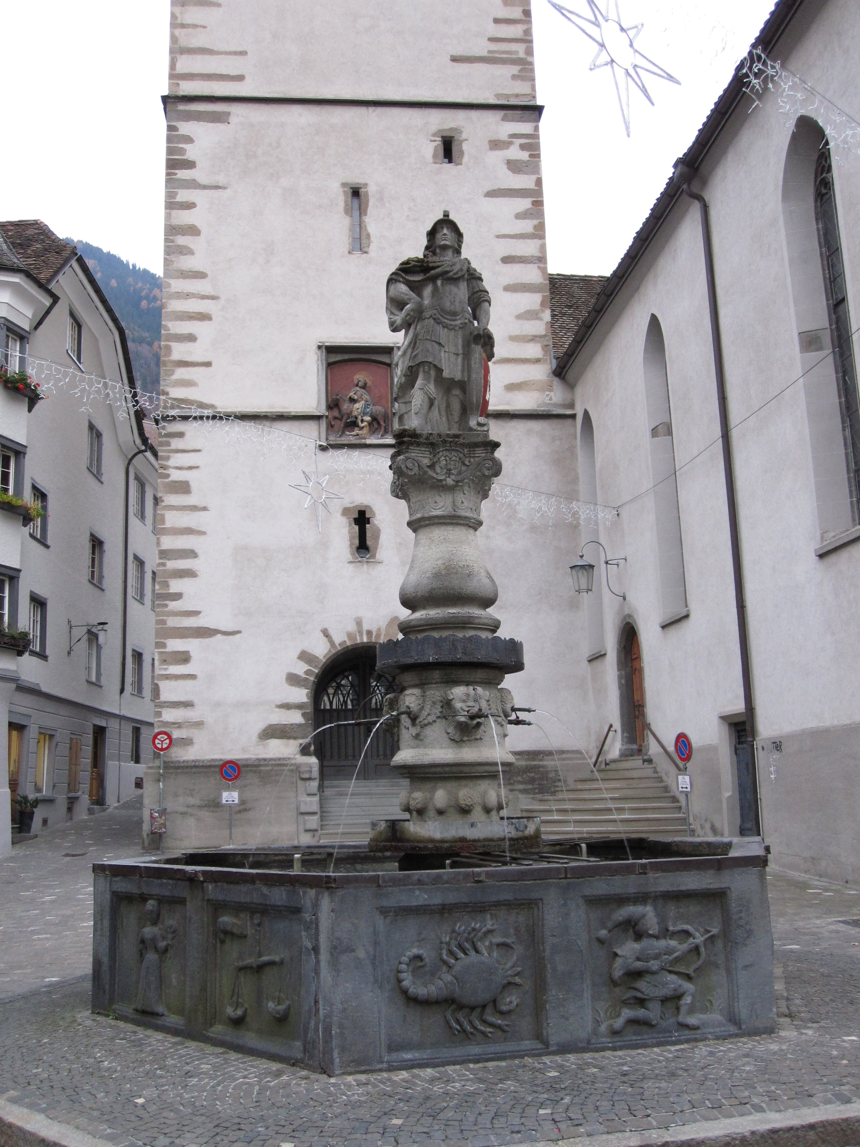 Martinsbrunnen in Chur (Kanton Graubünden, Schweiz)